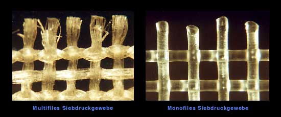 Fadenstruktur Siebdruckgewebe